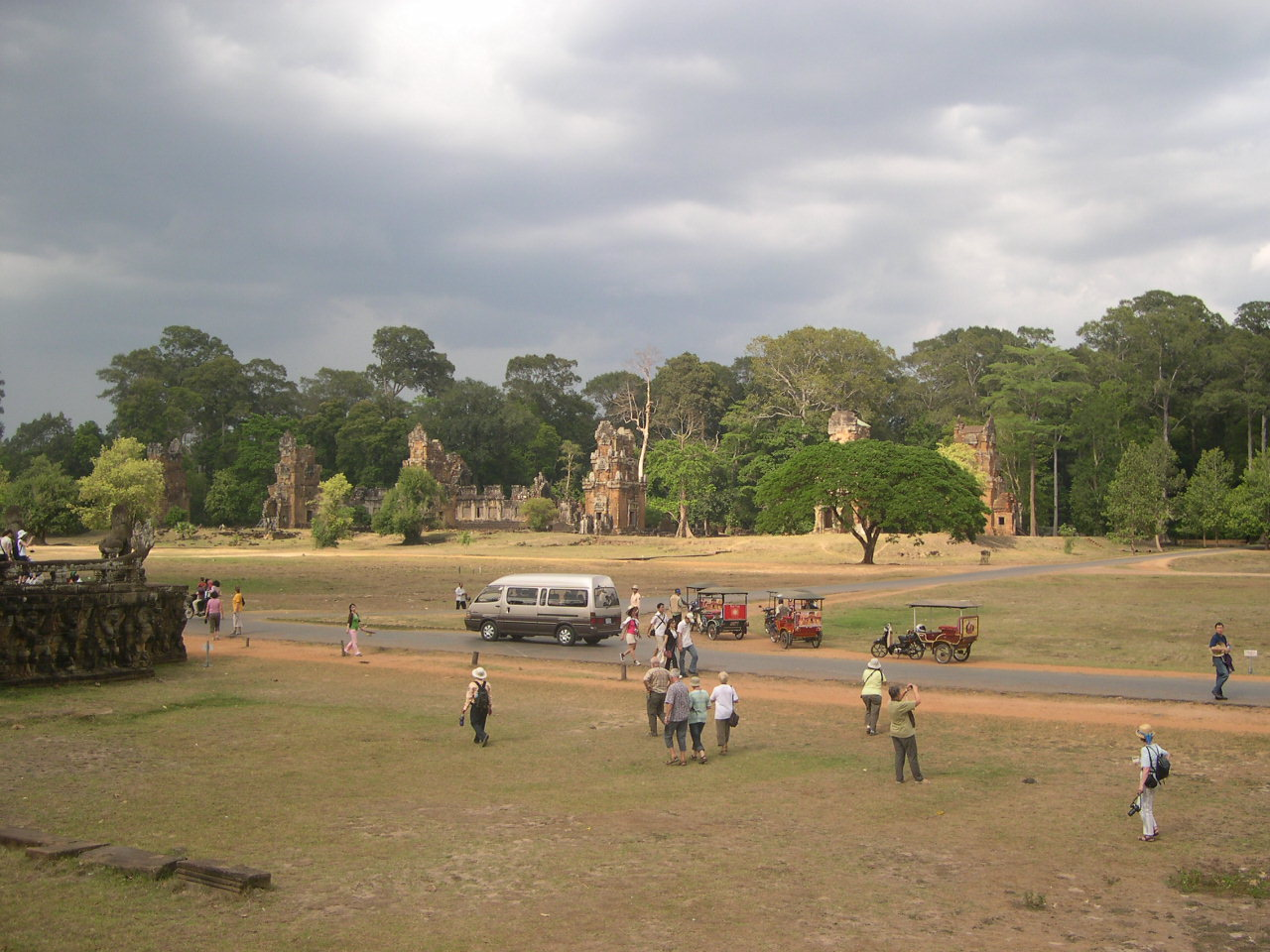 Prasat Sour Prat